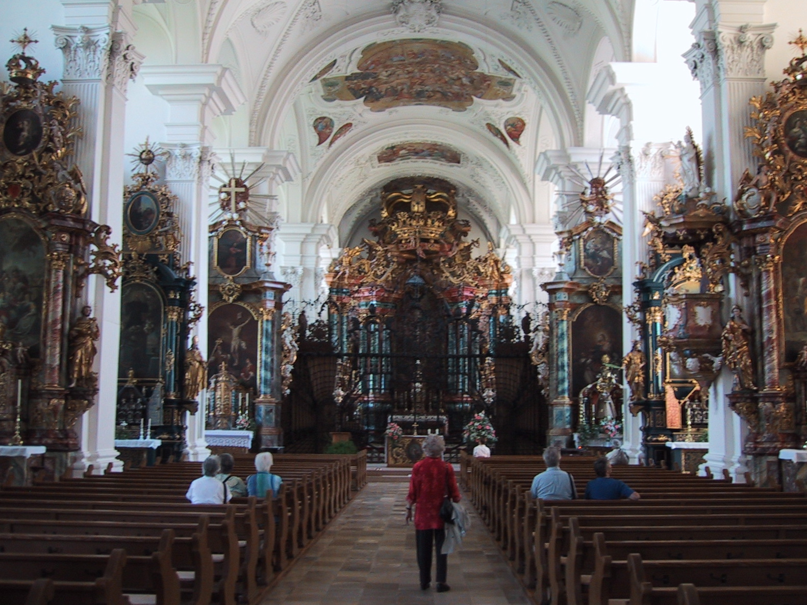 Aufnahme 22. Juni 2005, Inneres der Klosterkirche Rheinau, Kanton Zürich, Schweiz. Fotograf Peter Berger (selbst fotografiert). Lizenzstatus "GNU-FDL"